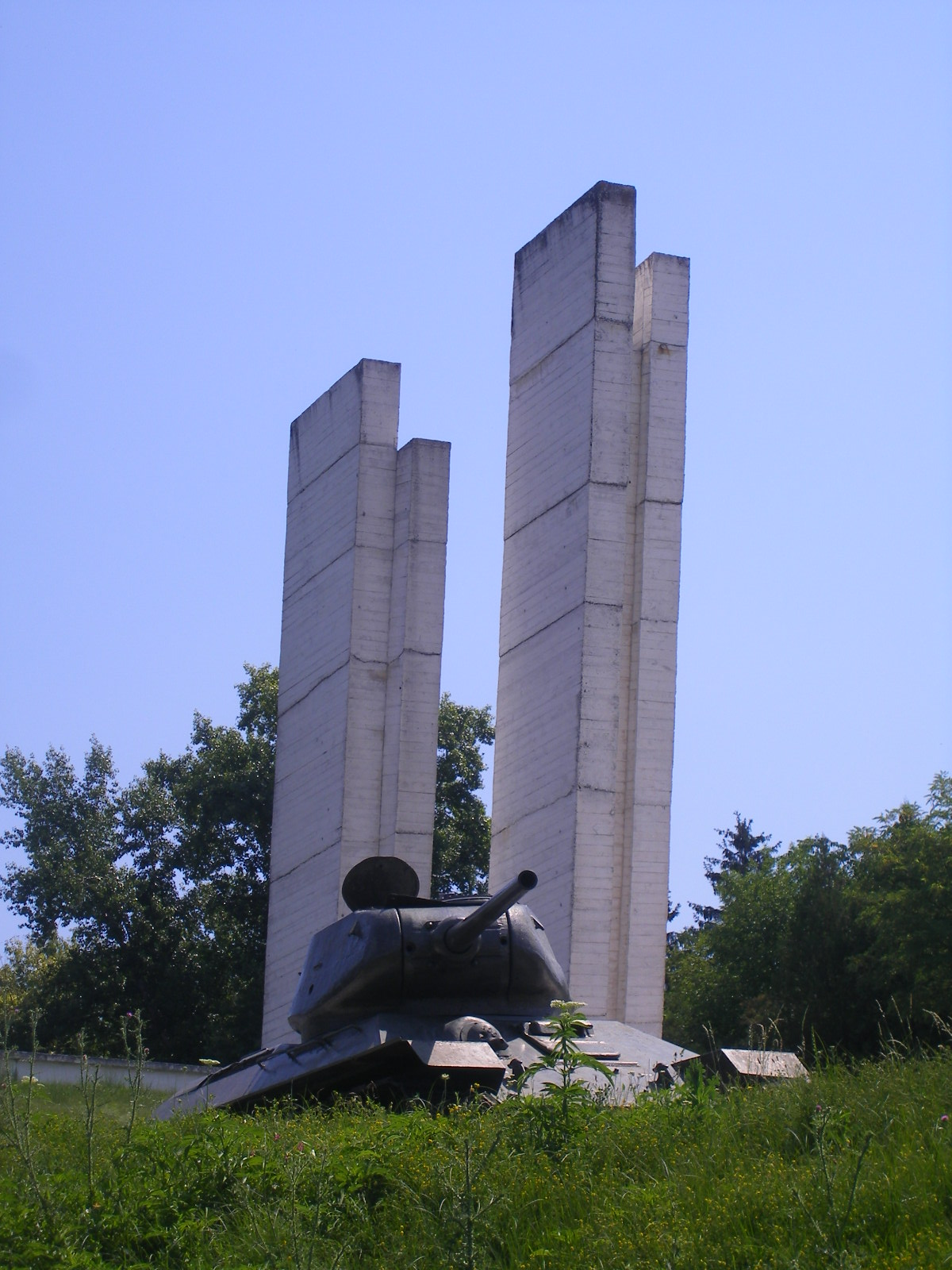 Kéménd - a második világháborús garami csaták emlékműve